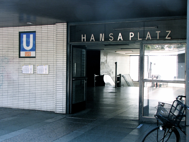 Tunnelbanestationen Hansaplatz, norra ingången